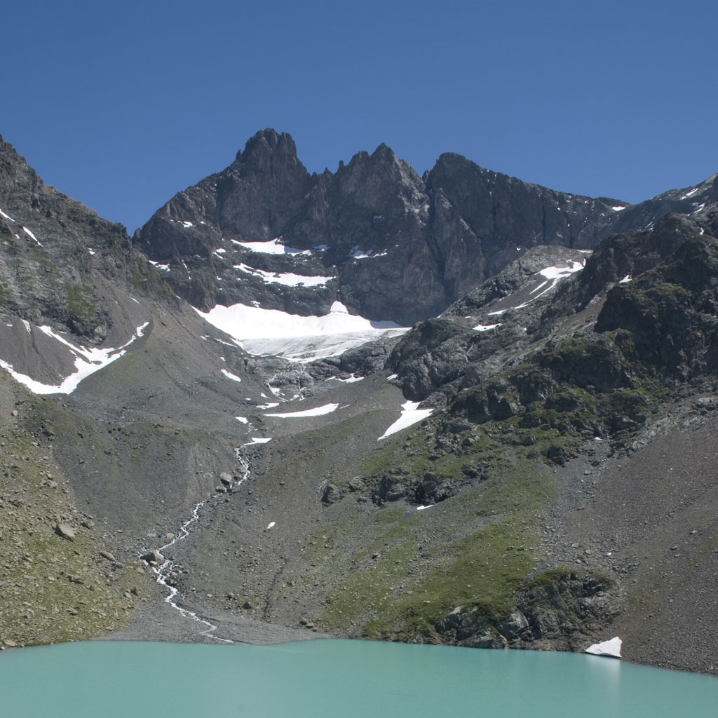 Glacier de Freydane en contrebas des Trois Pics de Belledonne. Avec le Lac Blanc (2161m).